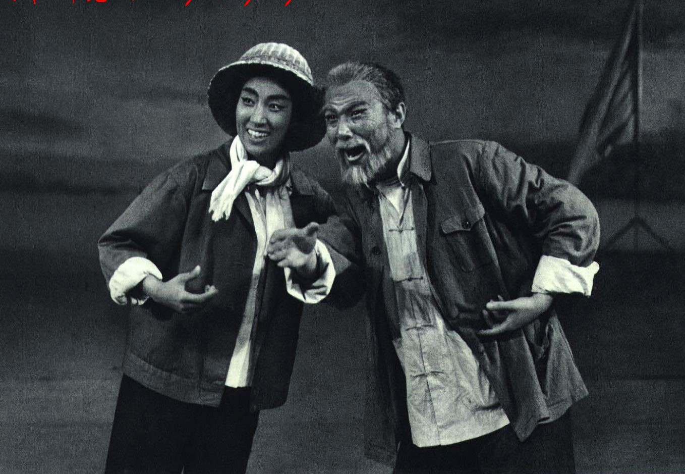 1967-08 1967年 海港